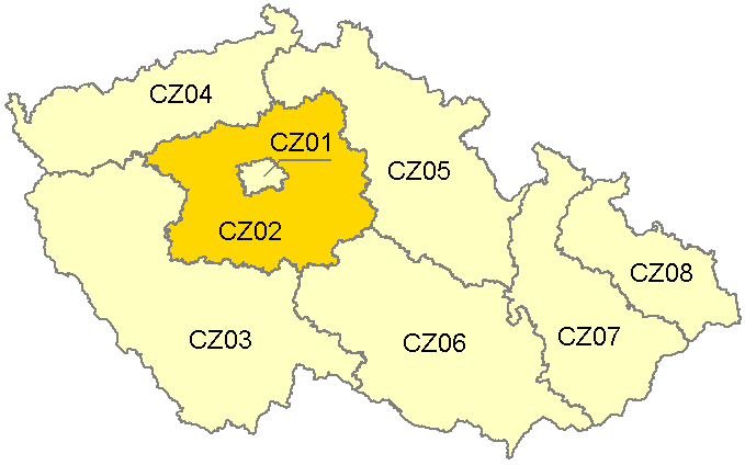 Mapa NUTS CZ01, jedné z osmi NUTS2 oblastí ČR